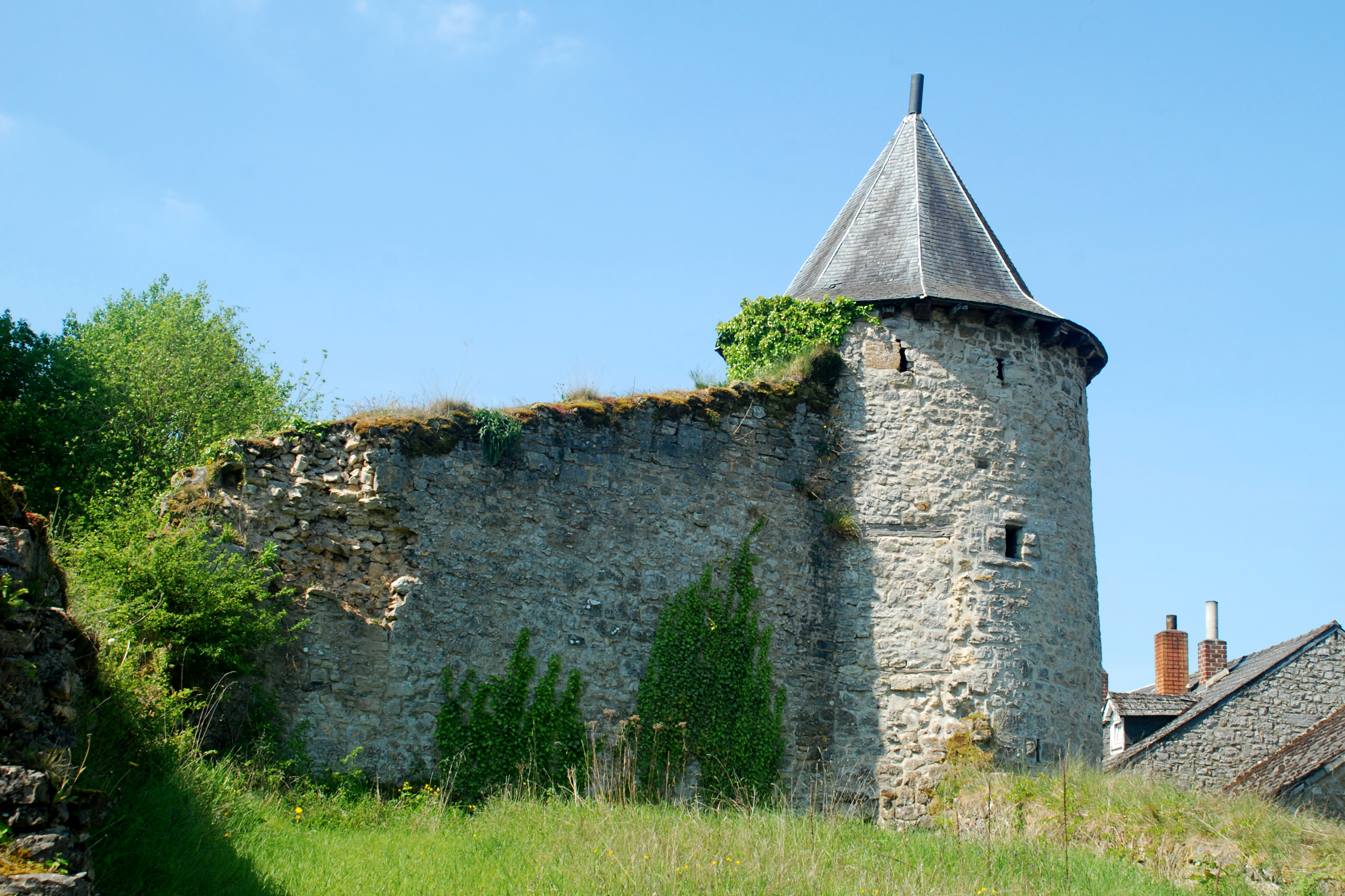 Belgique - Province de Namur - Viroinval - Nismes - Château du Pont d'Avignon